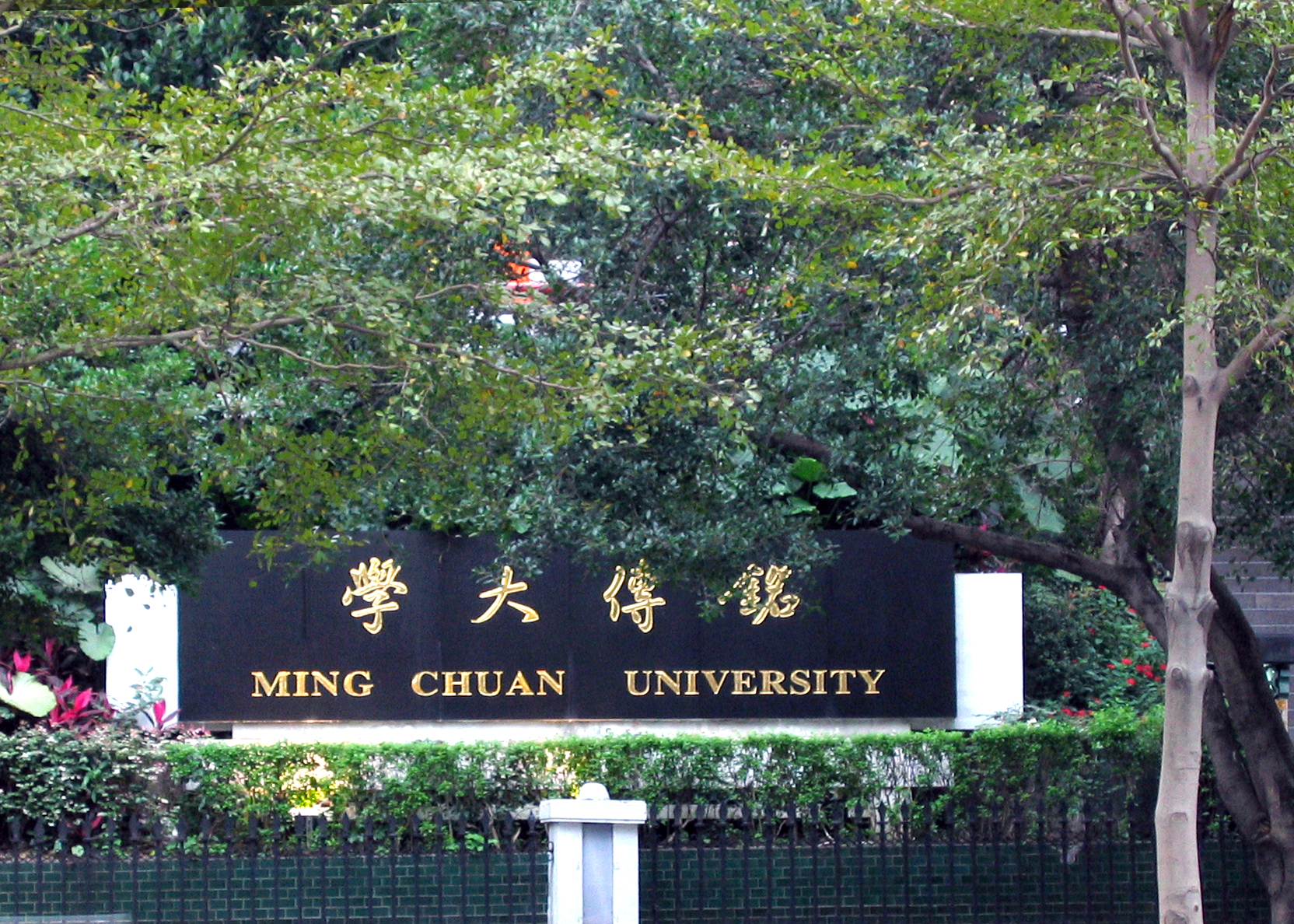 銘傳大學臺北校區校名石碑，2005年2月1日去銘傳大學臺北校區演講前順便照的。